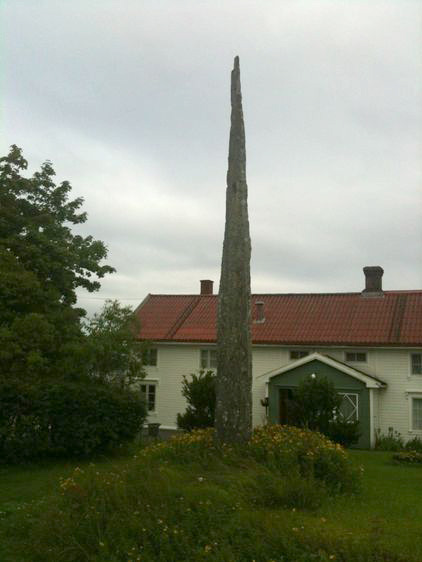 Trollpila. Foto: Sissel Carlstrøm/Vitenskapsmuseet. Fra Riksantikvarens Kulturminnesøk.